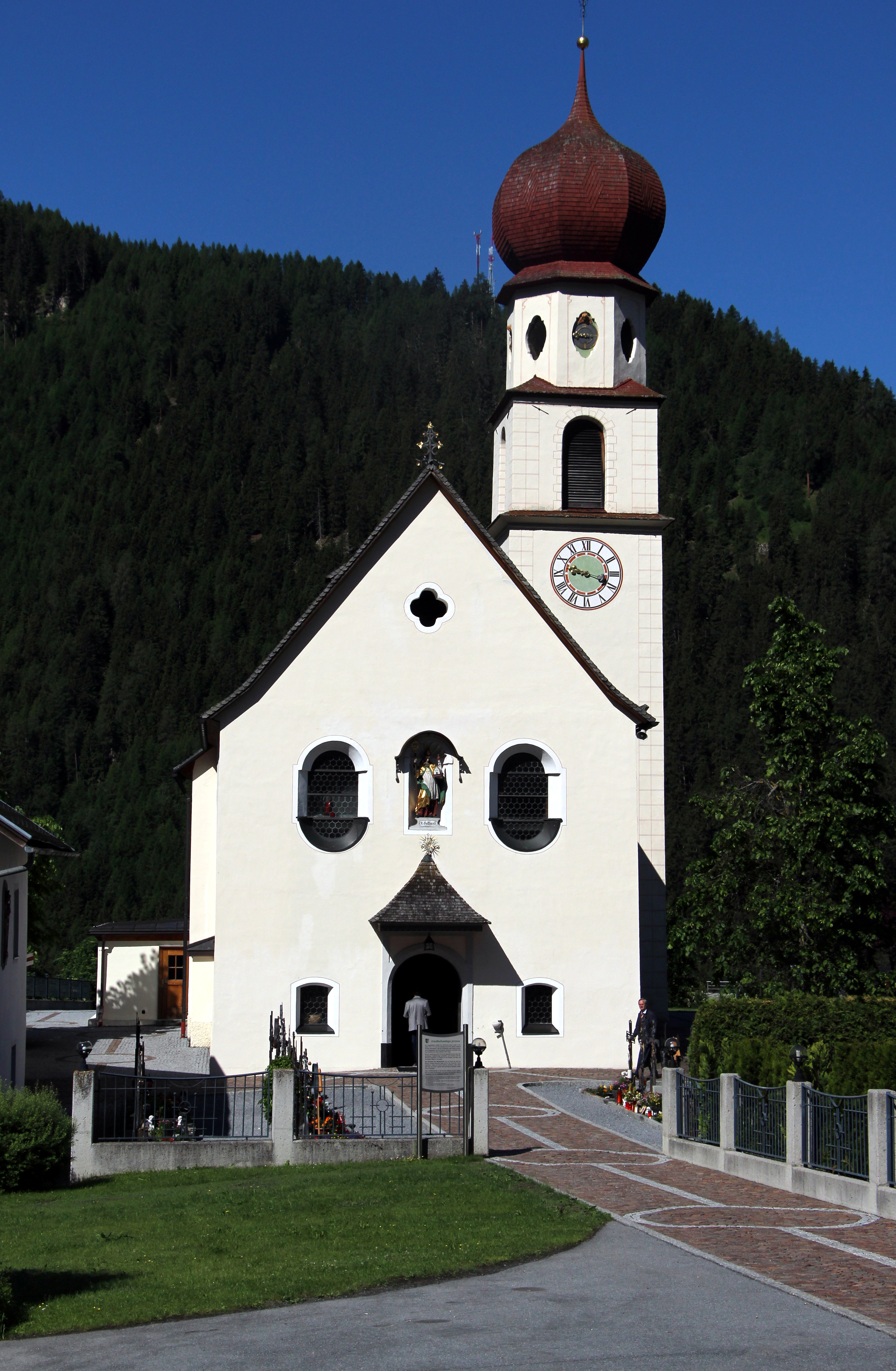 Kath. Pfarrkirche hl. Gotthard und Friedhof